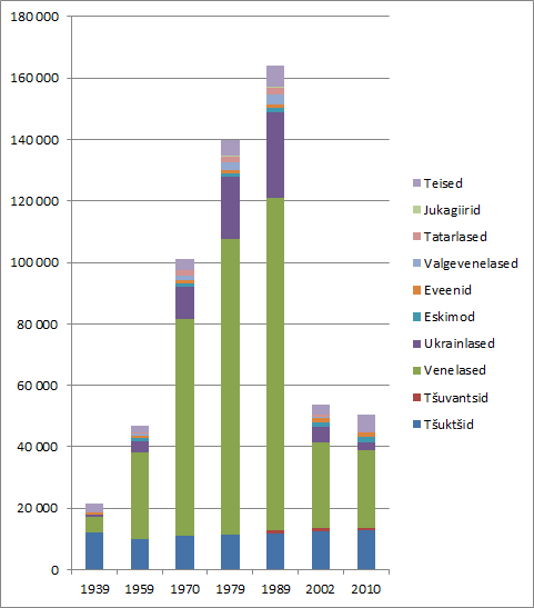 Tšuktšimaa rahvaarv ja koosseis 1939–2010 (artikli Tšuktšimaa tabeli järgi)